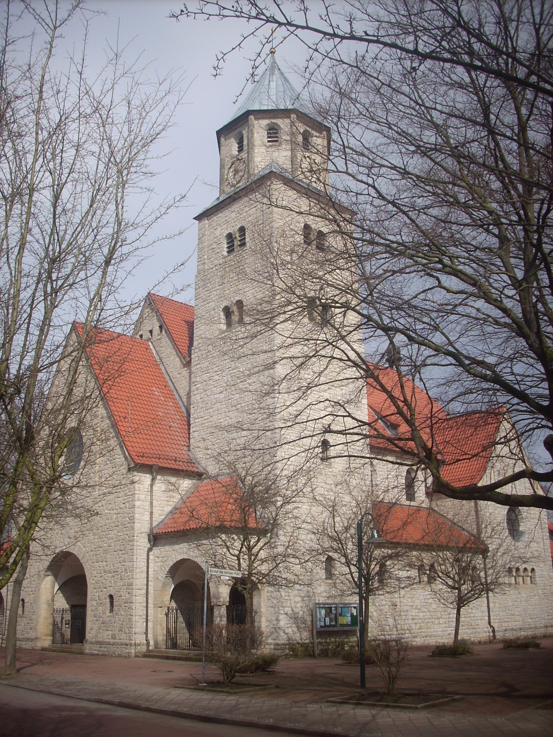 Sarstedt, kath. Pfarrkirche Heilig Geist